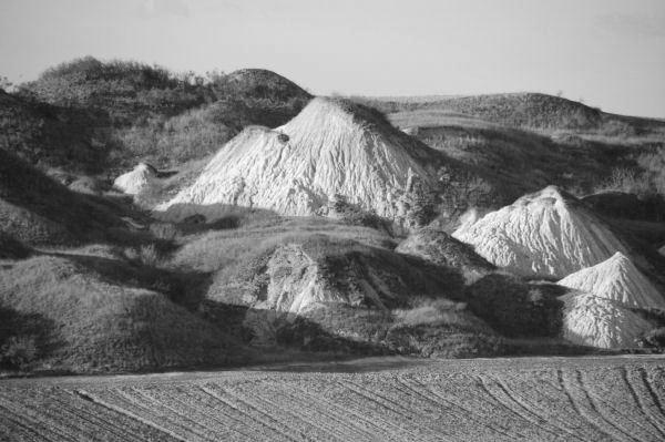 Biancane in Val d’Orcia, Toscana.